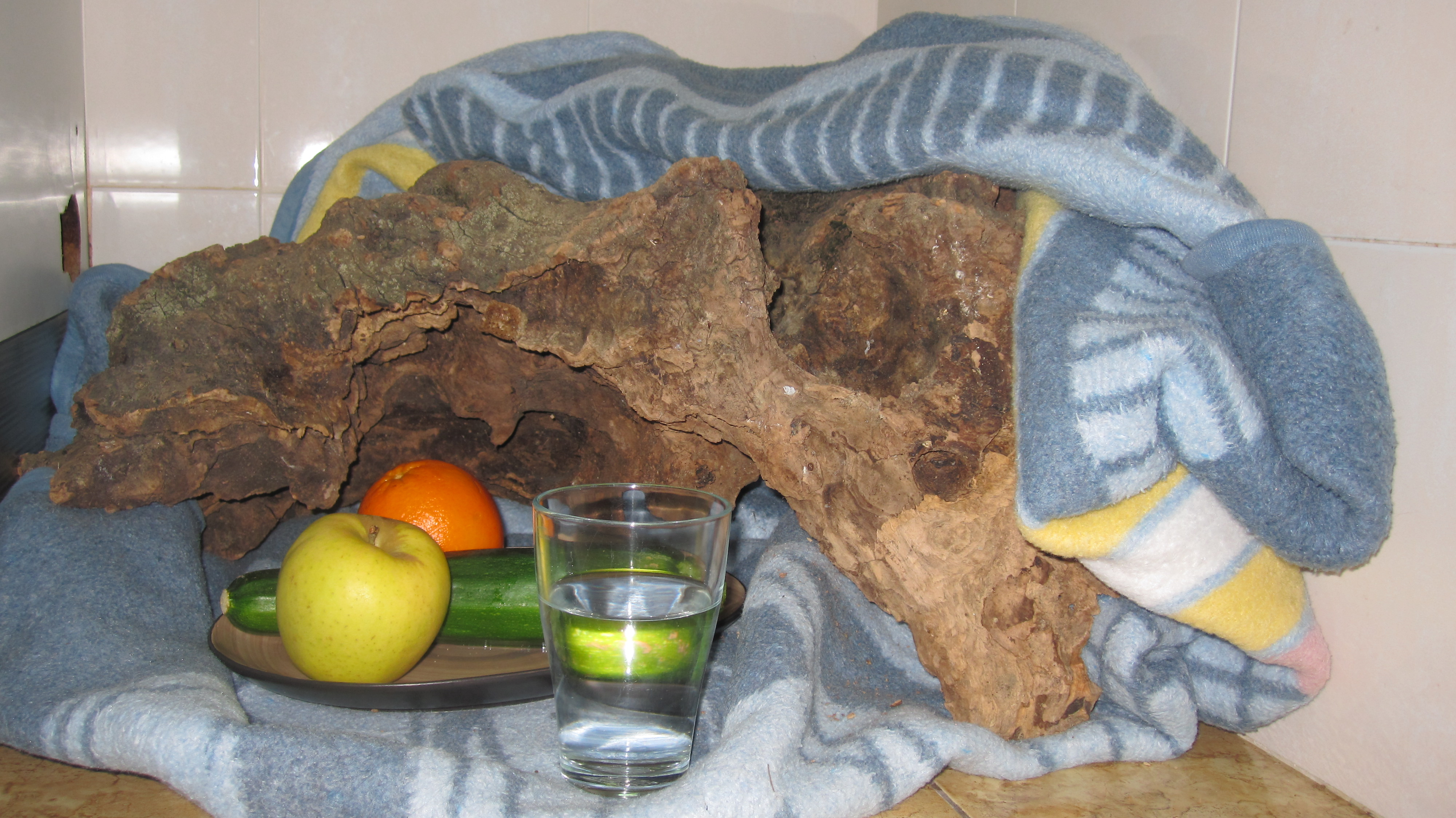 Soca d'olivera fent de Tió